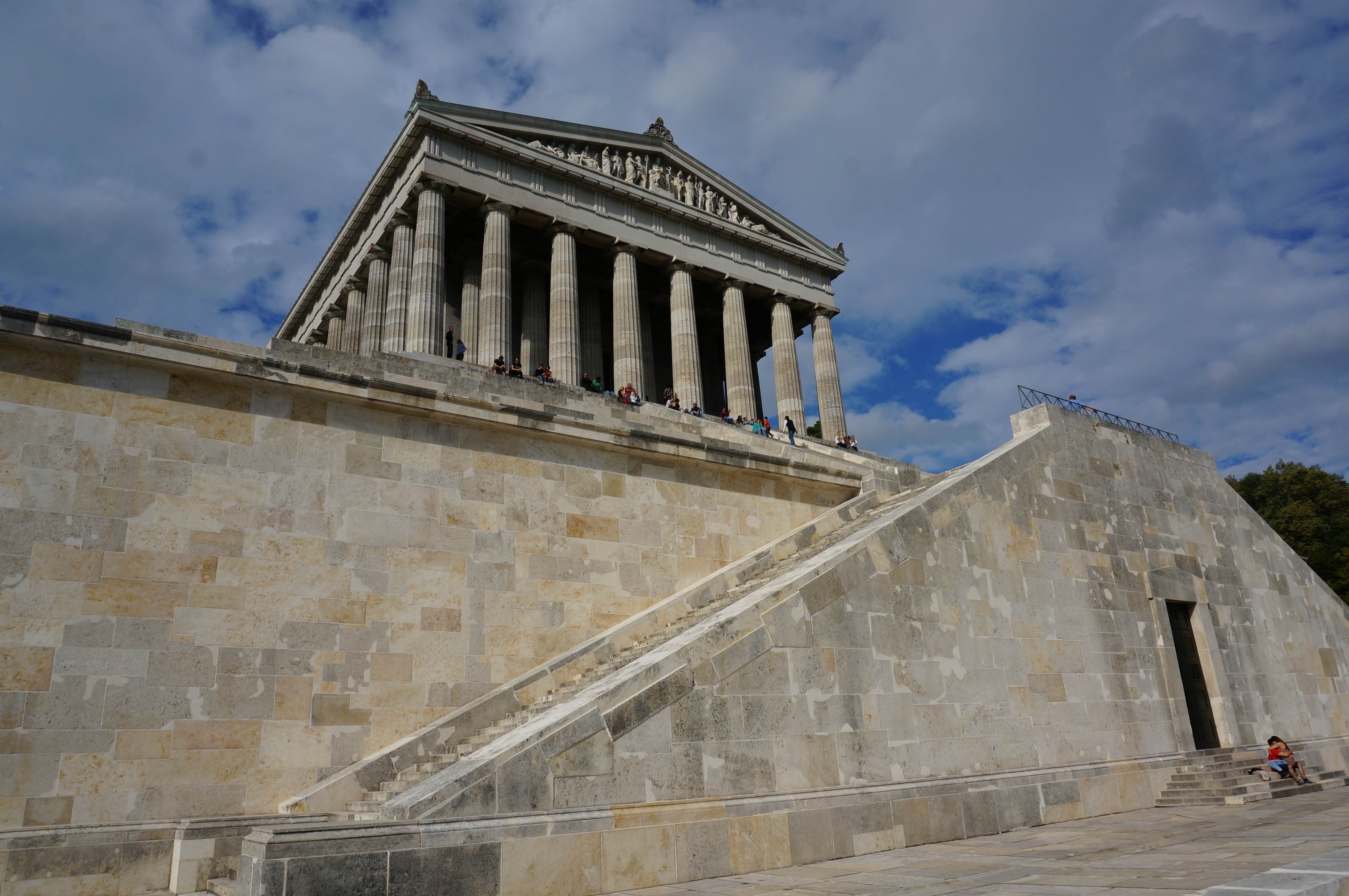 Images du monument classé Valhalla.